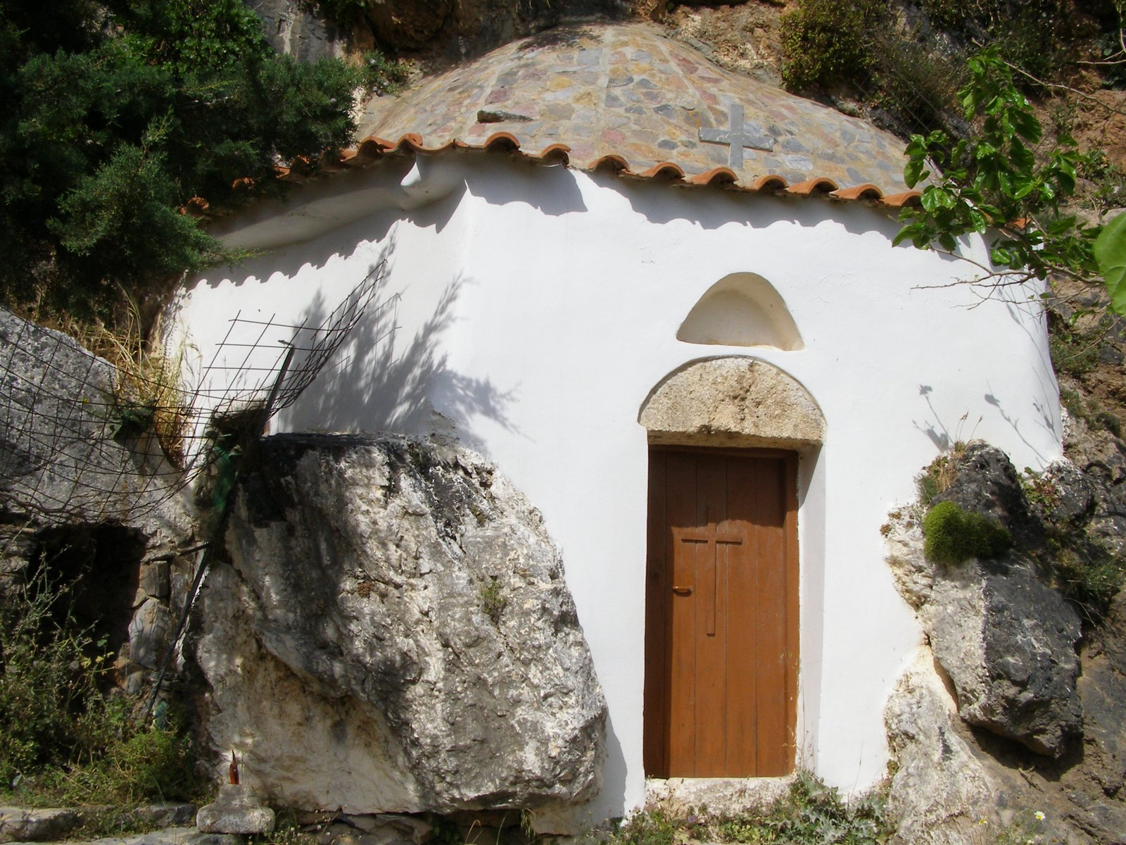 Kapelle des Heiligen Onoufrios oberhalb von Mariou, Kreta